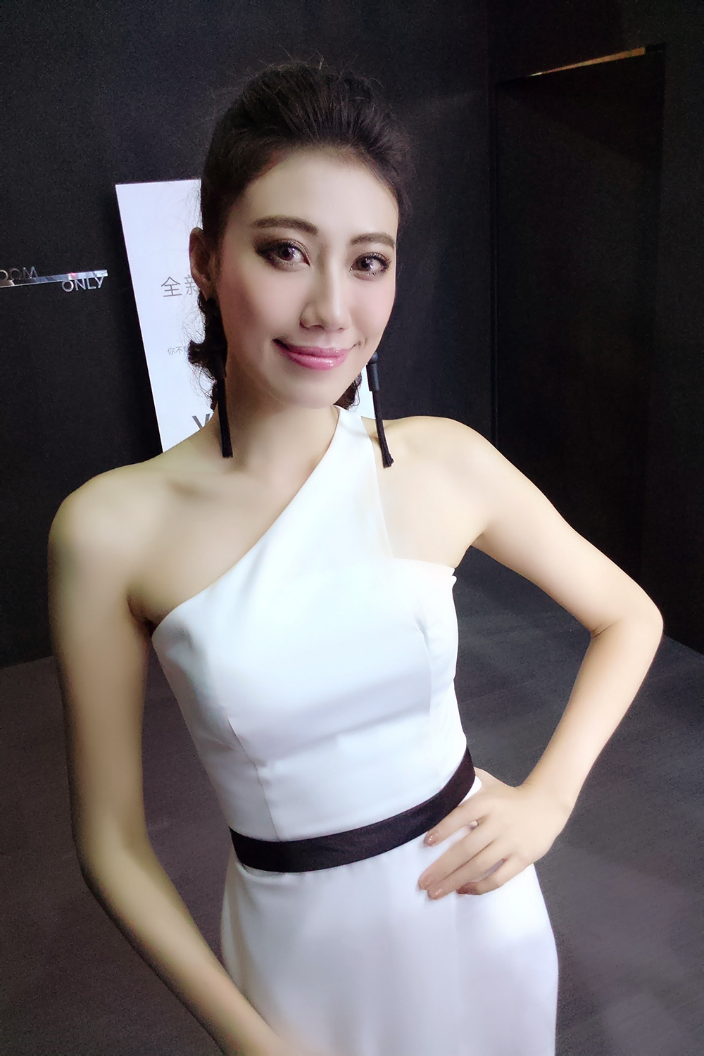 20171231 紀艾希 at 台北國際新車大展 Infiniti展區